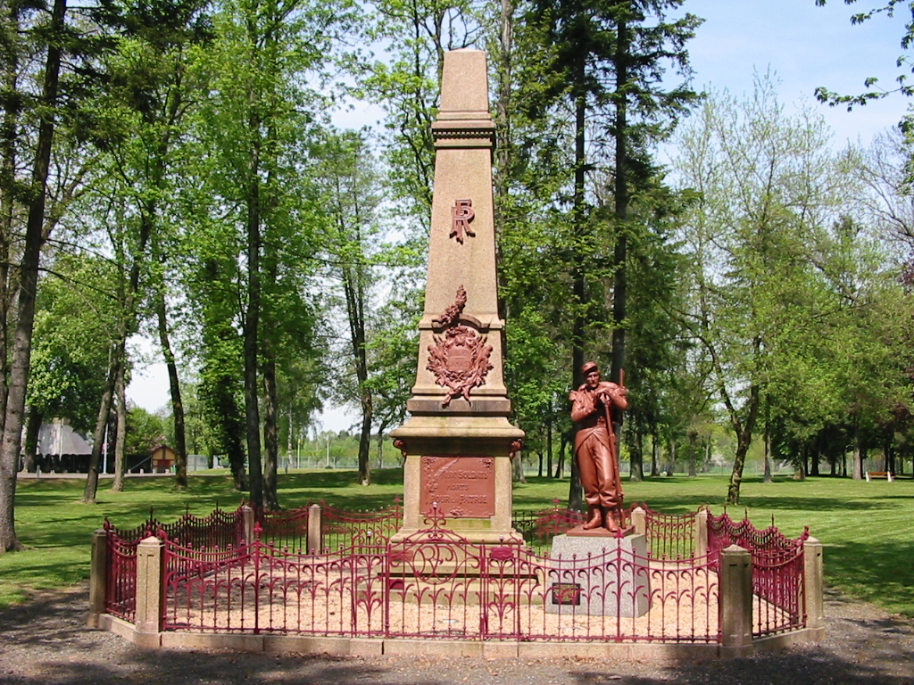 Monument des Vétérans, Baccarat (Meurthe-et-Moselle)